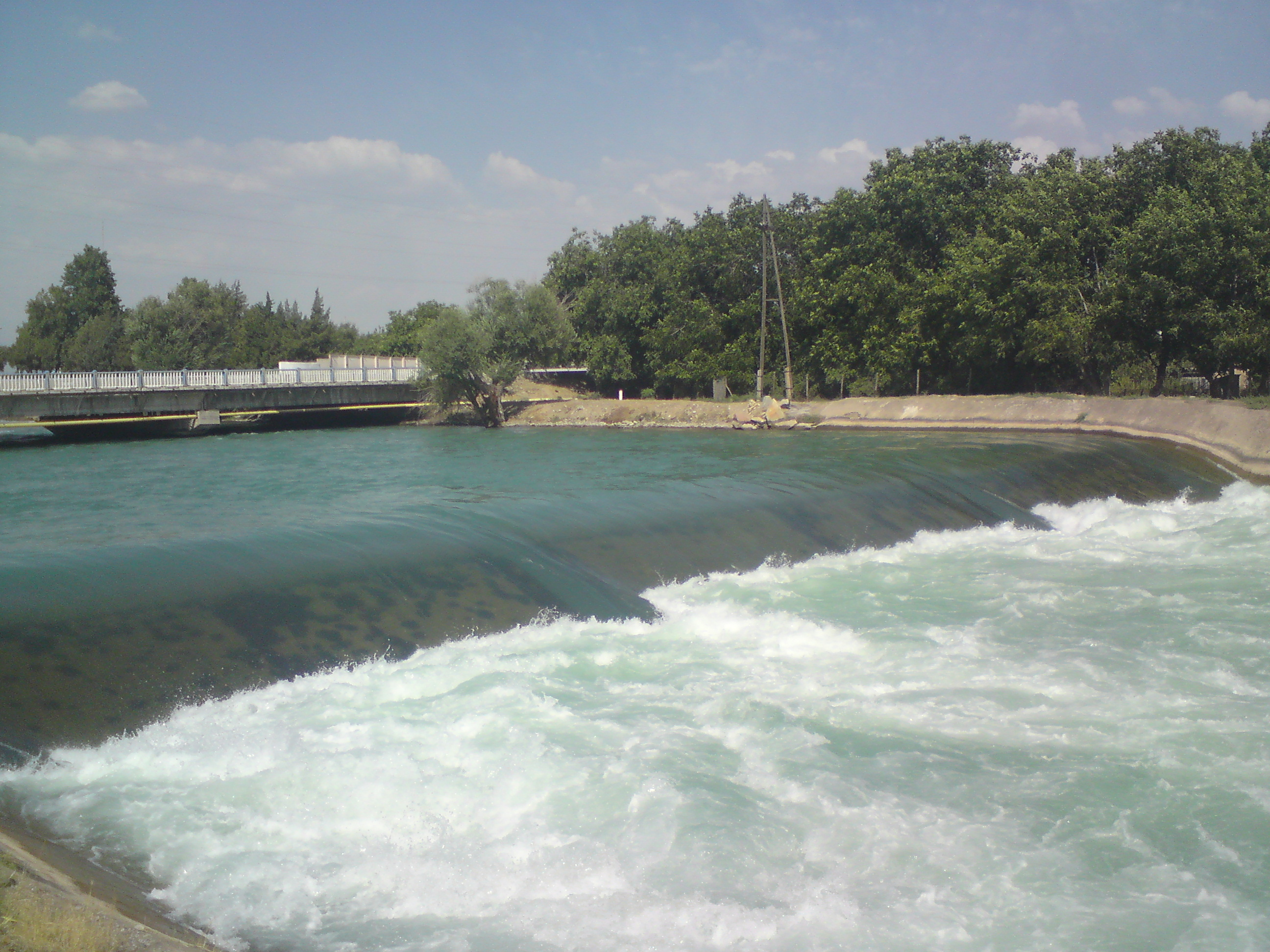 Водоскат на канале (преобразованном из реки) Левобережный Карасу, немного ниже начала посёлок Саксаната, у города Чирчика, Ташкентский вилоят, Узбекистан